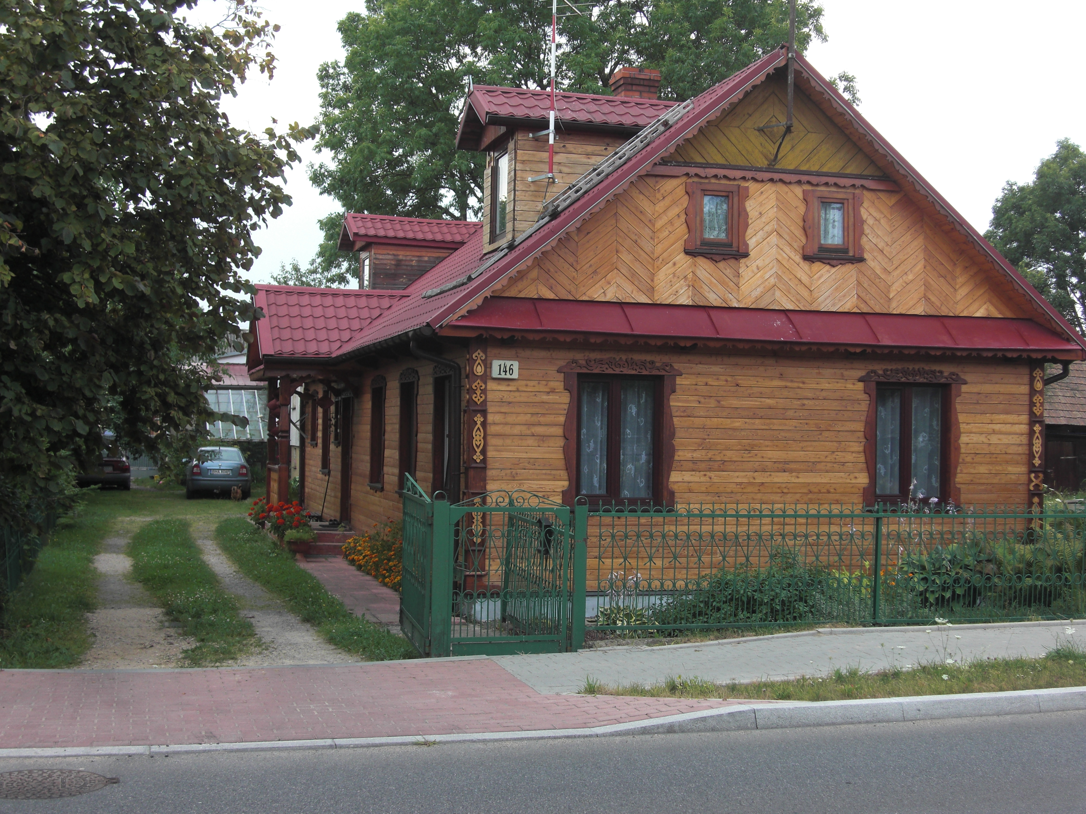 Nowosady 146, współczesny drewniany dom